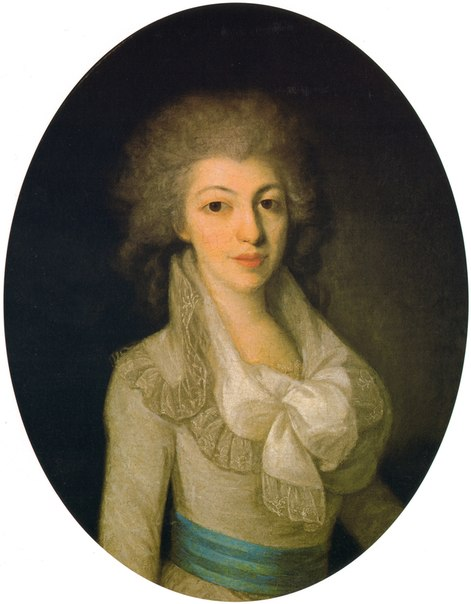 Княгиня Дарья Александровна Трубецкая, урожд. княжна Грузинская (176.– 1796), дочь князя Грузинского Александра Бакаровича Грузинского и Дарьи Александровны Меншиковой, внучки светлейшего князя. В самом конце 1780-х вышла замуж за князя Петра Сергеевича Трубецкого (1760–1817), была матерью пяти детей, в том числе князя Сергея Петровича (1790–1860), декабриста. Похоронена в Спасо-Преображенском соборе города Лысково Нижегородской губернии.